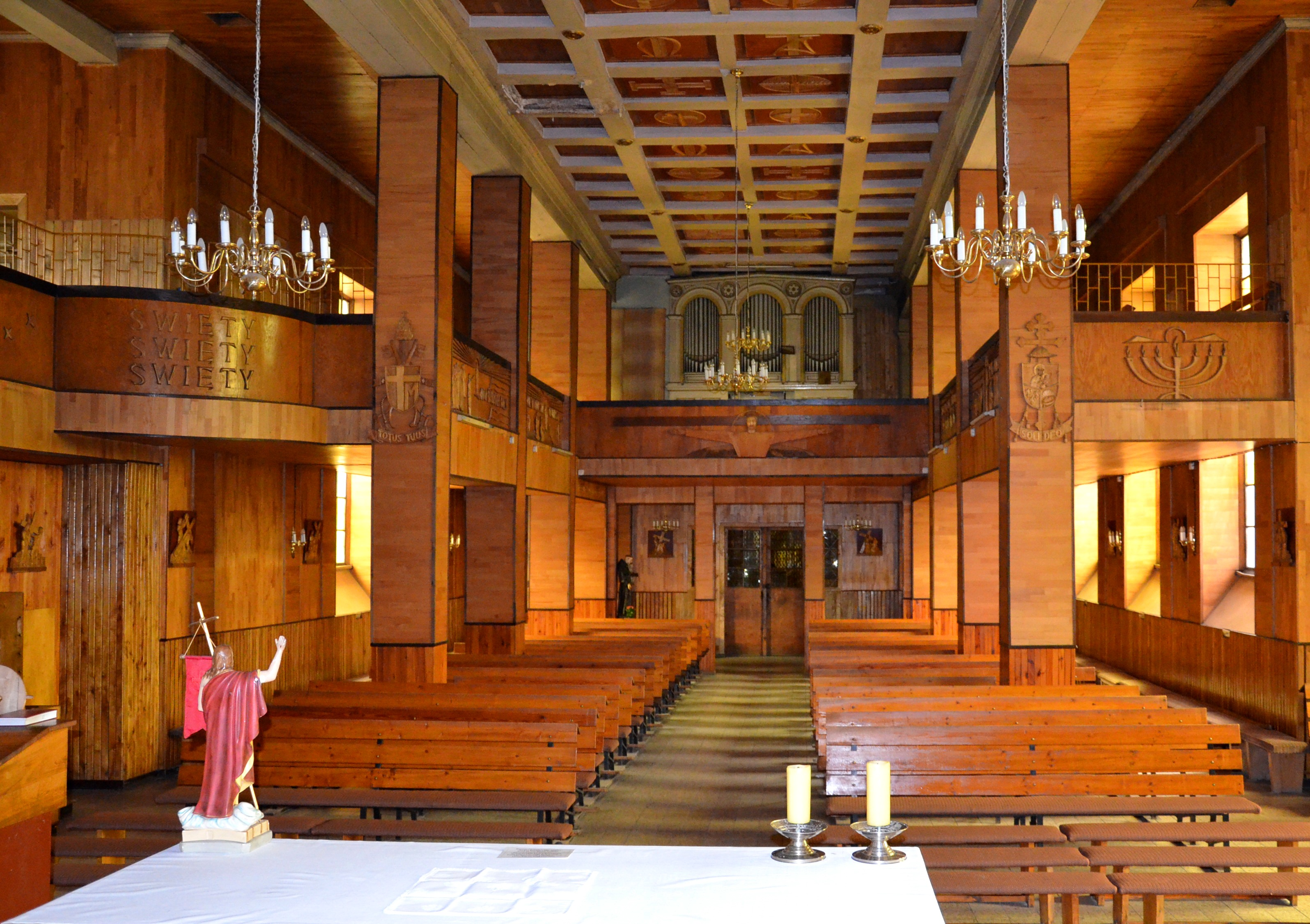 Wągrowiec, kościół ewangelicki, ob. rzym.-kat. fil. p.w. śś. Piotra i Pawła, 1834-1835